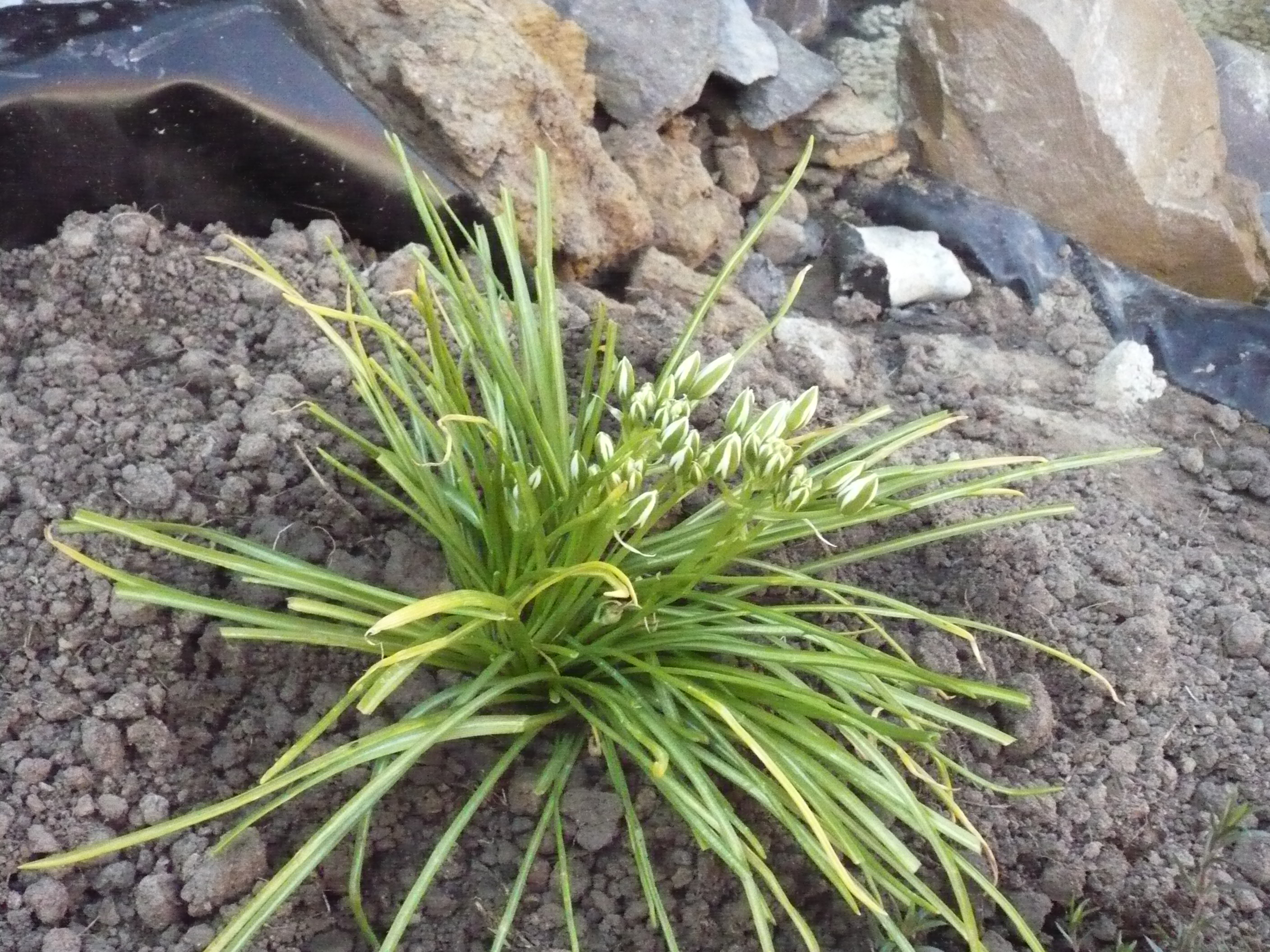 Dame de onze heures, bulbe à fleur blanche toxique.